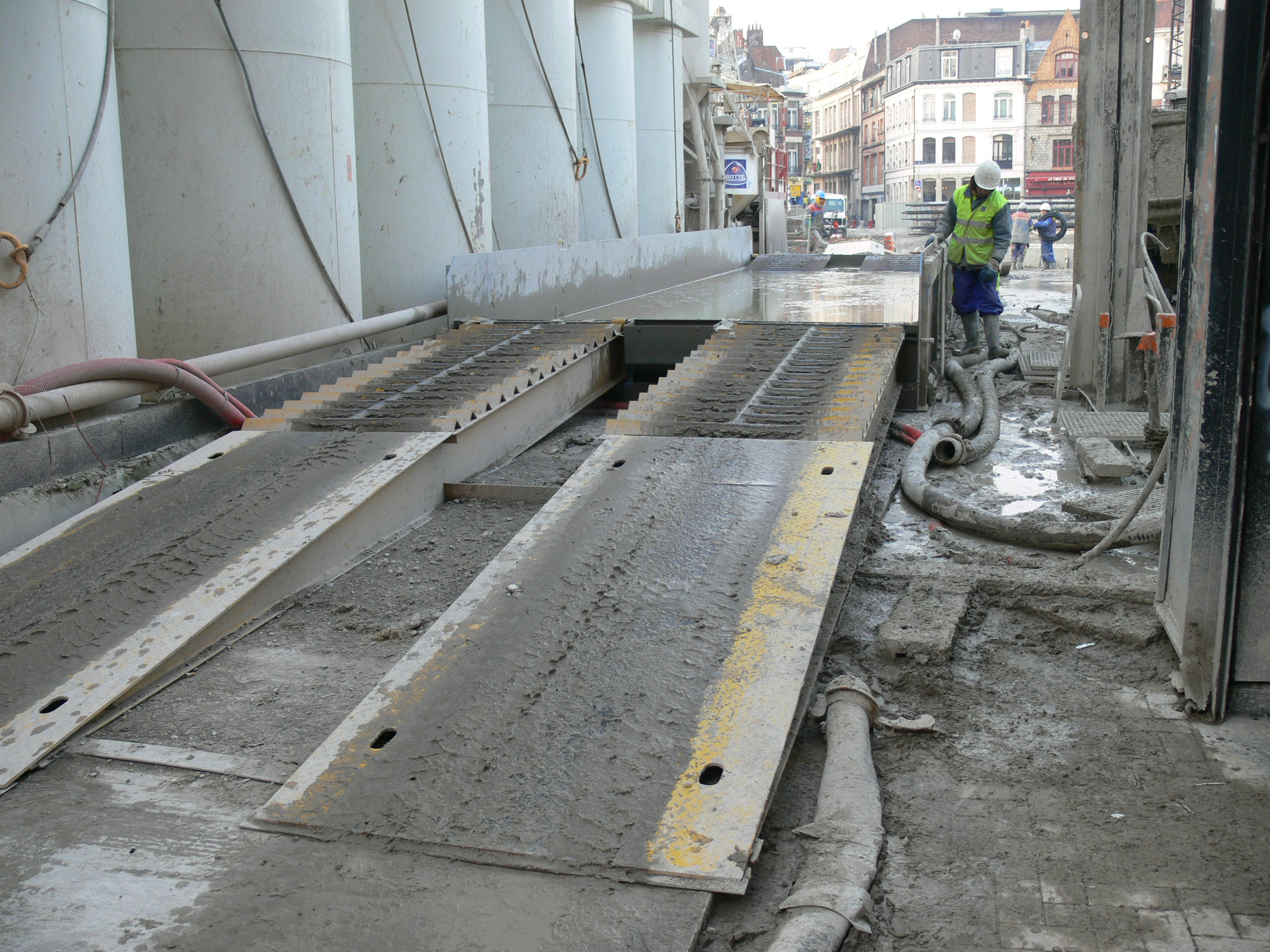 description : Les rotoluves sont des bacs (ou zones construites provisoires) qui servent à nettoyer, décontaminer ou désinfecter les roues de véhicules. Ils sont généralement construits sur place, mais pour les camions ou engins lourds ou pour un usage durable, des rotoluves peuvent être loués ou achetés. Le modèle qui figure sur la photographie est destiné au nettoyage des roues de camions sortant d'un chantier situé en pleine ville. Le désinfectant utilisé doit être choisi en fonction du pathogène qu'on cherche à éliminer; Photo de Florent Lamiot (janvier 2006)